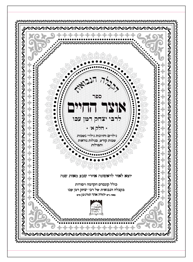 ספר אוצר החיים לרבי יצחק דמן עכו